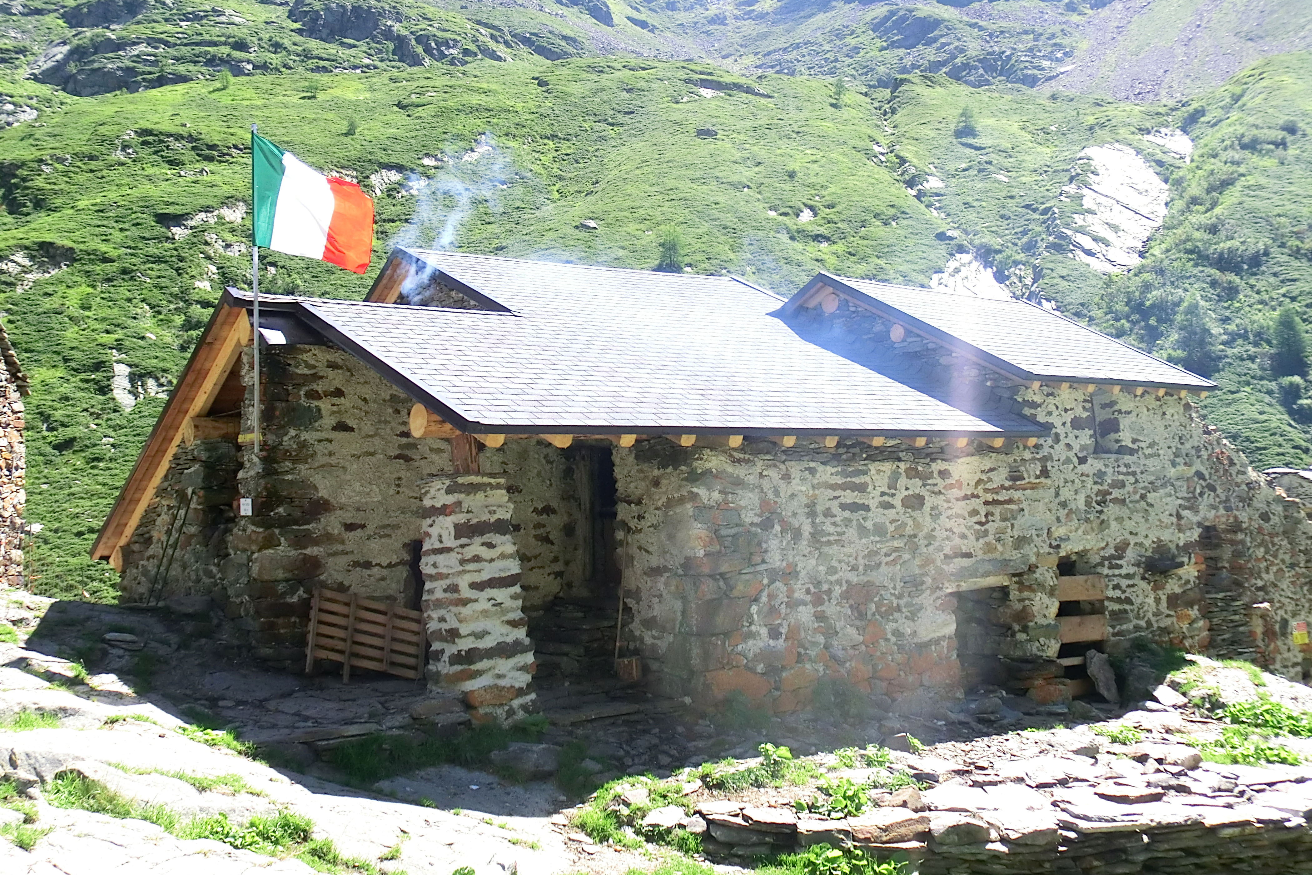 Il punto di appoggio CAI dopo la ristrutturazione avvenuta nell'estate del 2016.